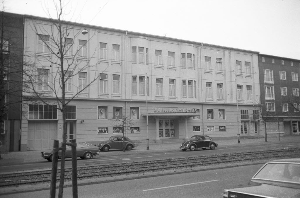 Schauspielhaus in der Holtenauer Straße 103